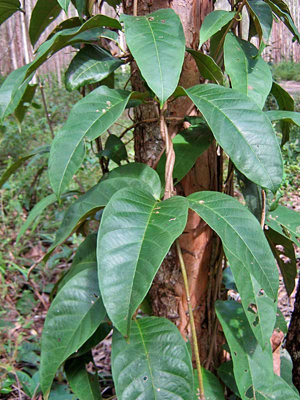 Habitat.